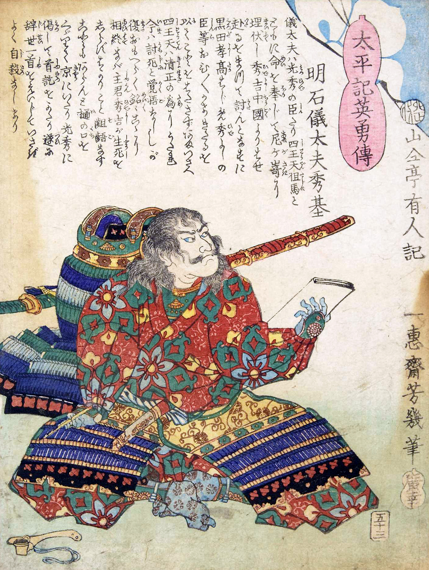 「太平記英勇伝五十三：明石儀太夫秀基（＝明石全登）」